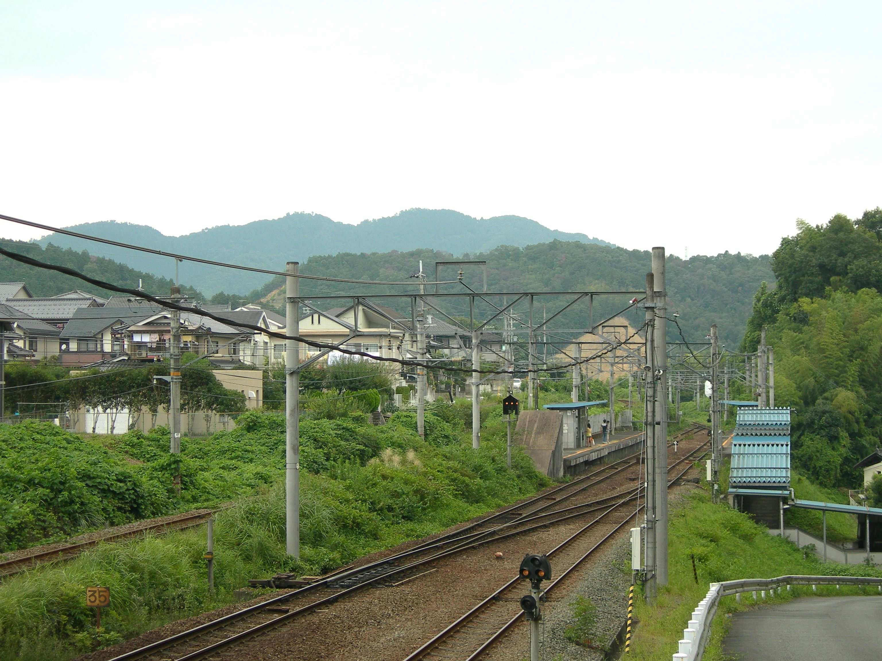 荒河かしの木台駅ホーム遠景